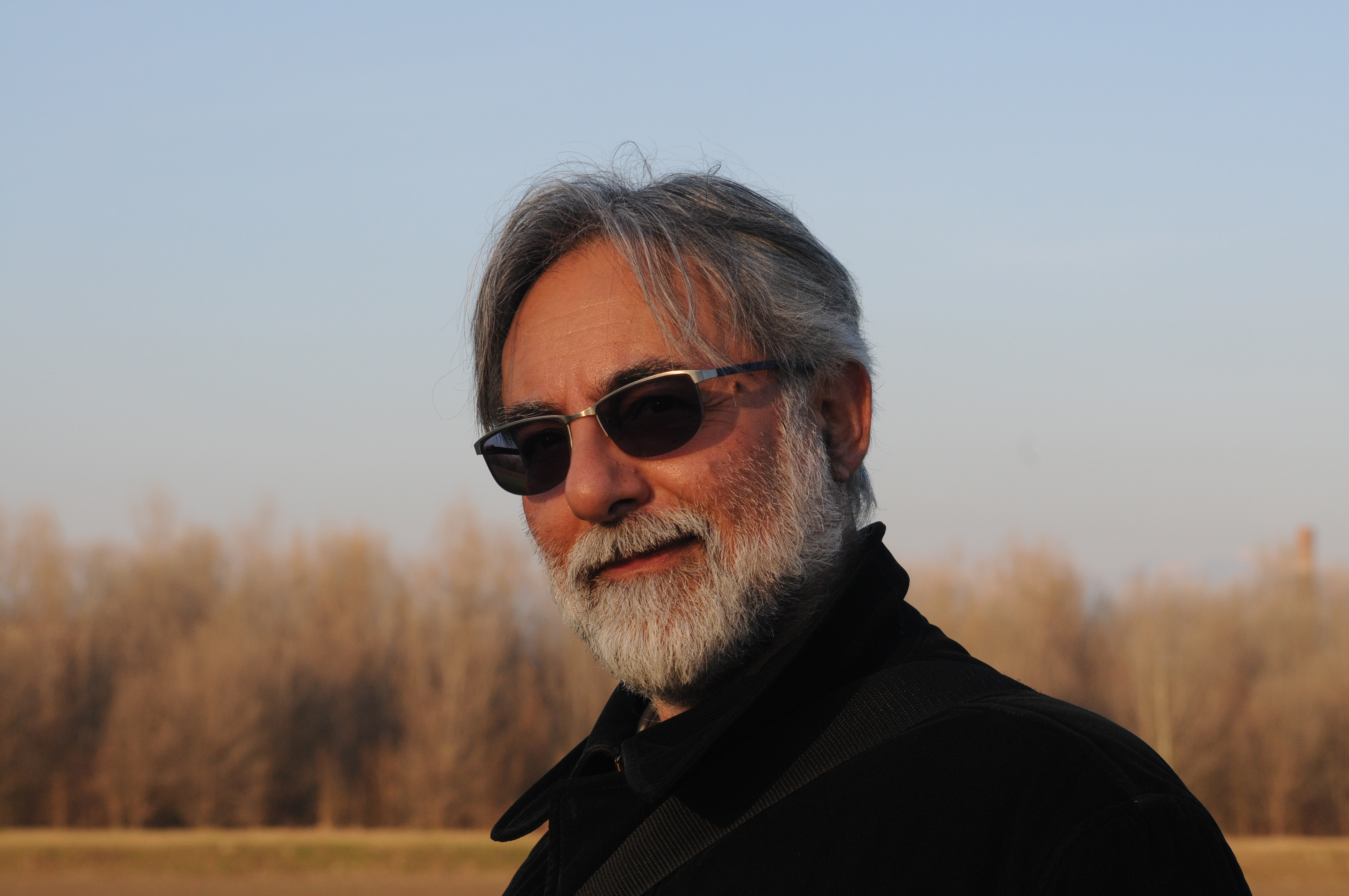 Maurizio Damiano